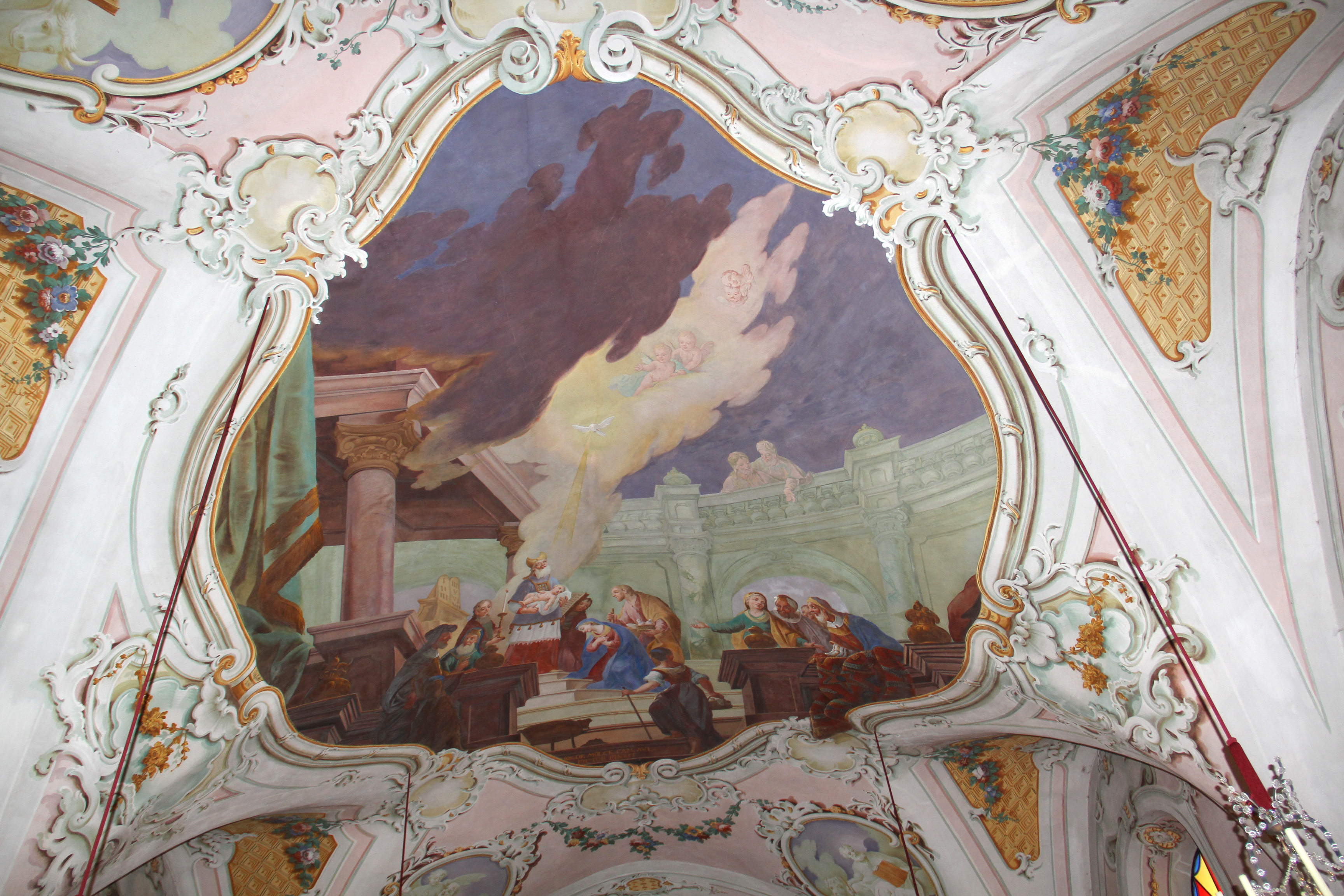 Kath. Filialkirche hl. Georg und Kirchhofanlage, Fresken von Joseph Adam Mölk